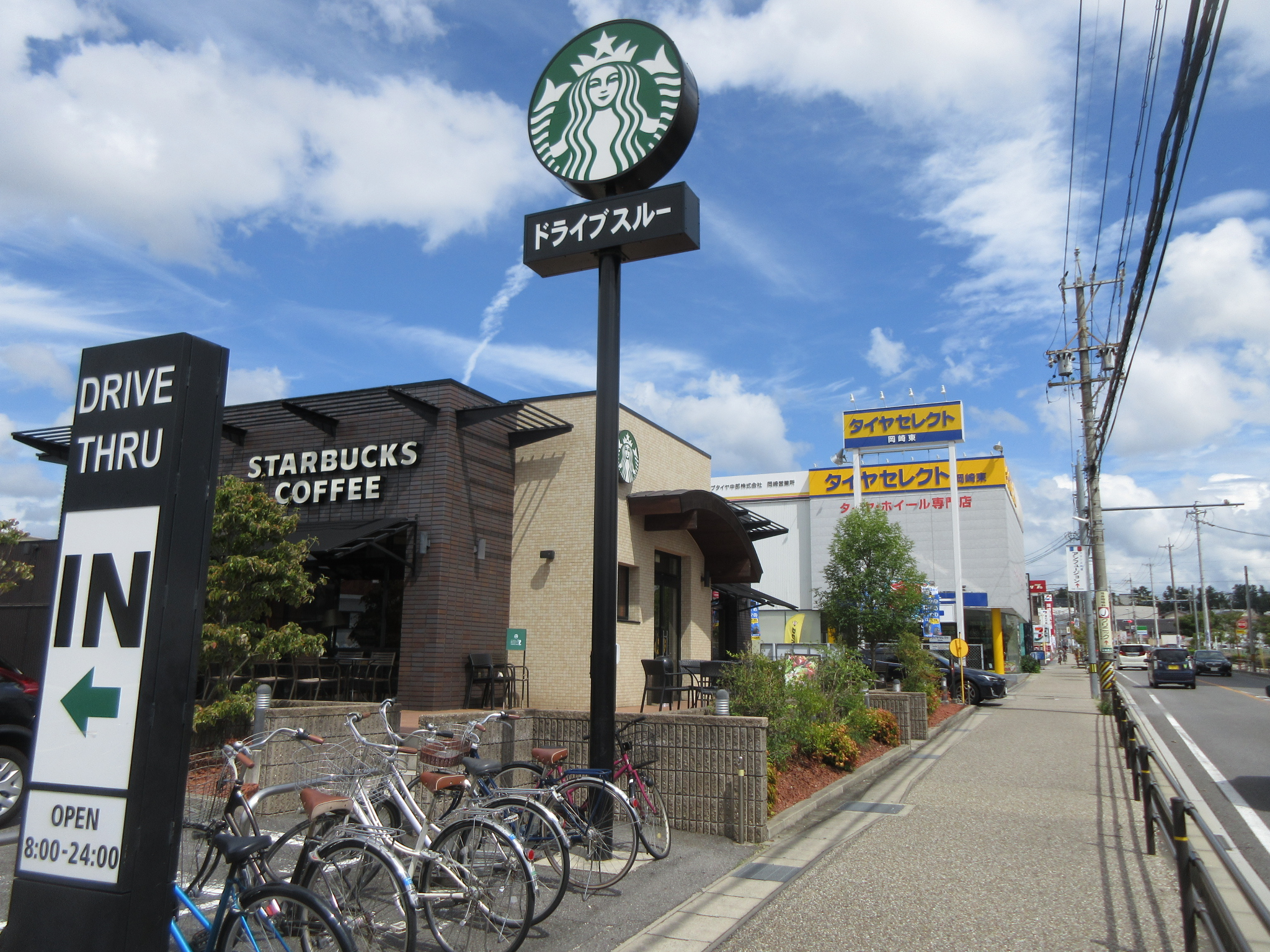 スターバックスコーヒージャパン岡崎竜美店（愛知県岡崎市竜美西）